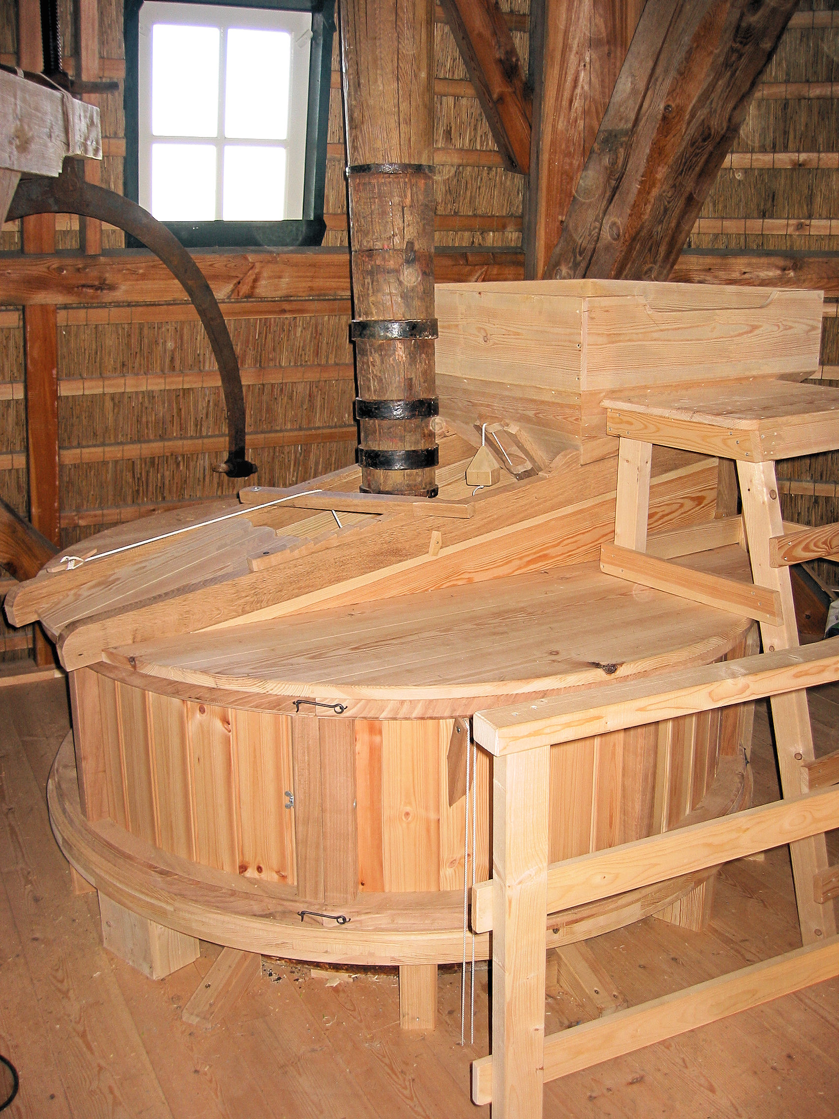 Maalkoppel met balanceerrijn van de Concordia molen te Ede